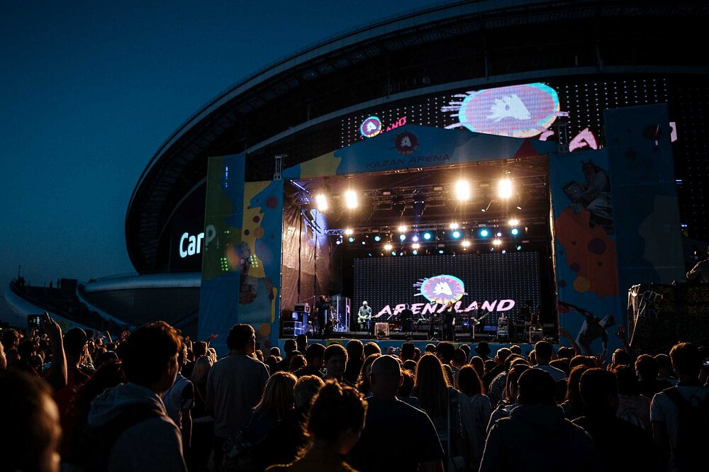 Фестиваль Arenaland на Казань Арене